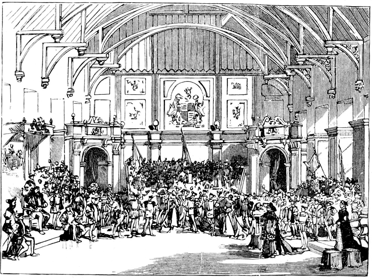 Saint-Saëns - Henry VIII - Illustrations de presse 1903 - 3e acte - La salle du Synode